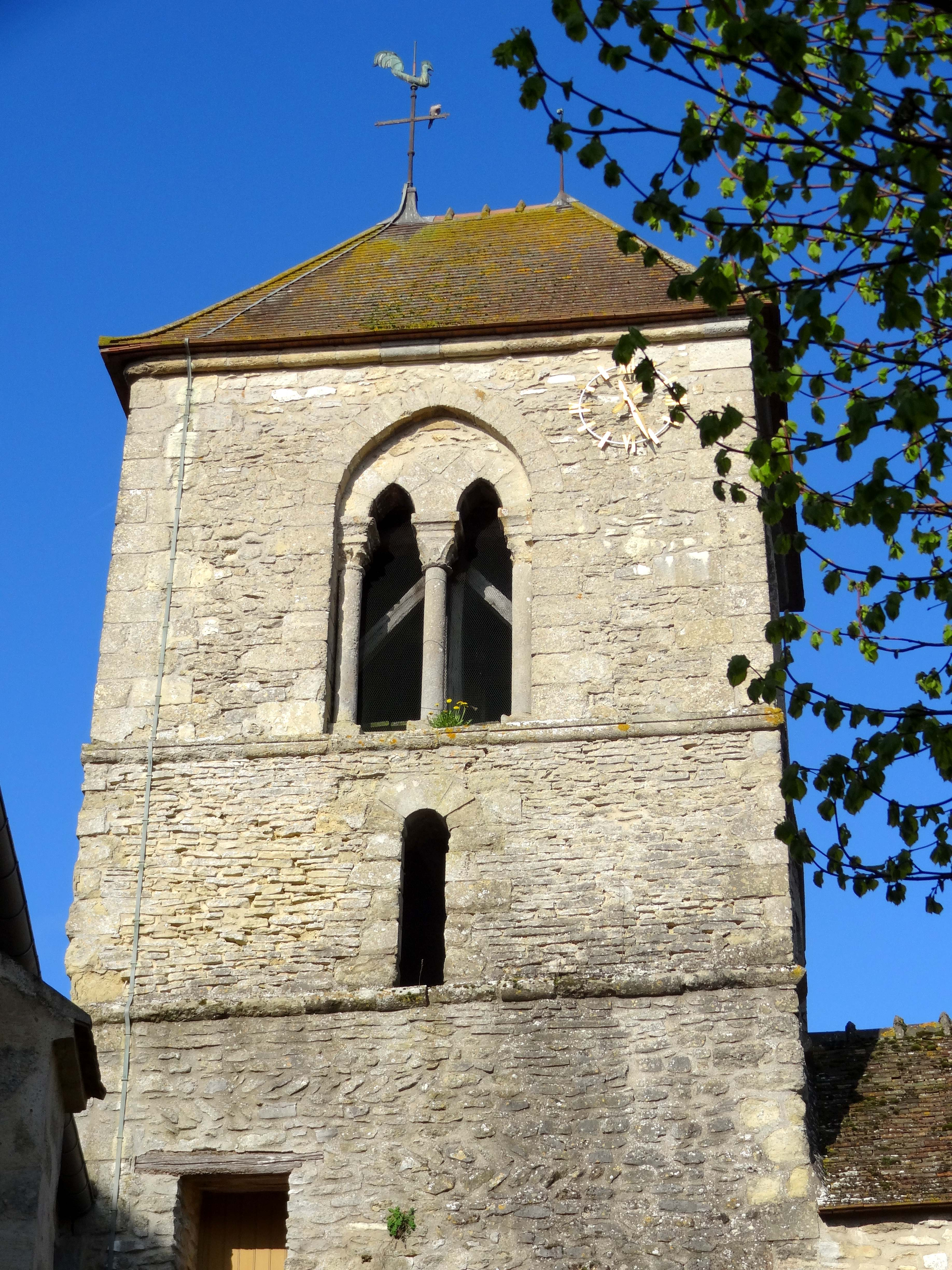 Église Saint-Martin de Follainville - voir titre.